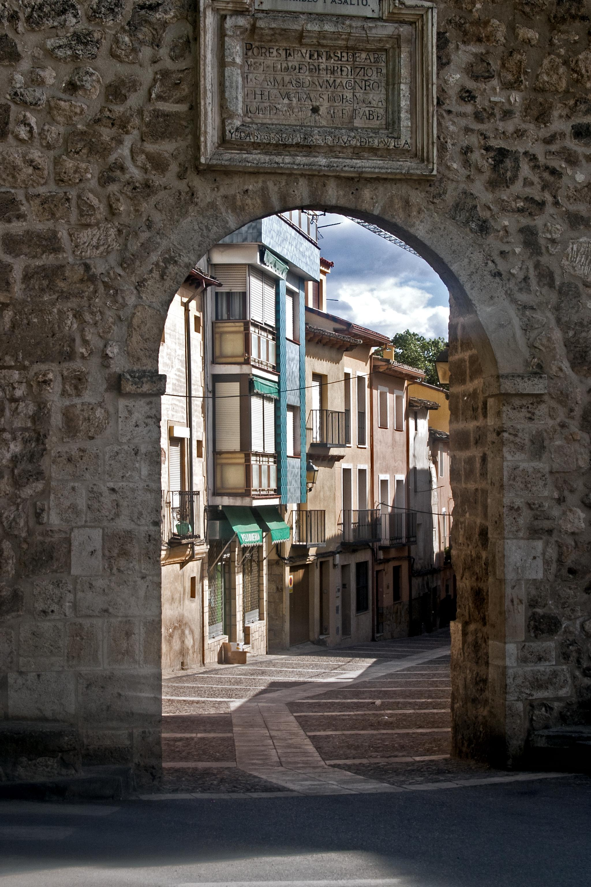 Brihuega 11